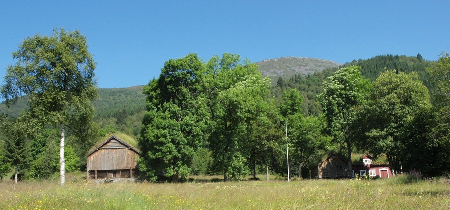 Brudavollen Ørsta